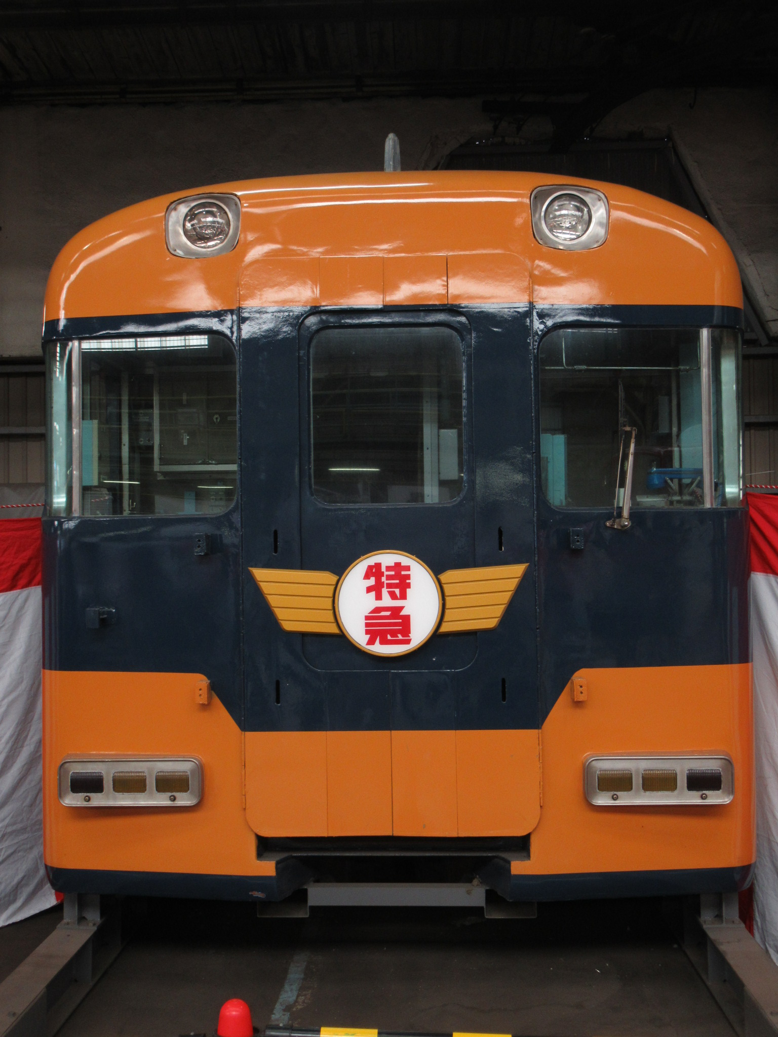 近鉄18400系カットボディ 高安工場